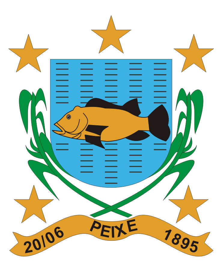 Brasão de Armas do município de Peixe, Tocantins, Brasil.